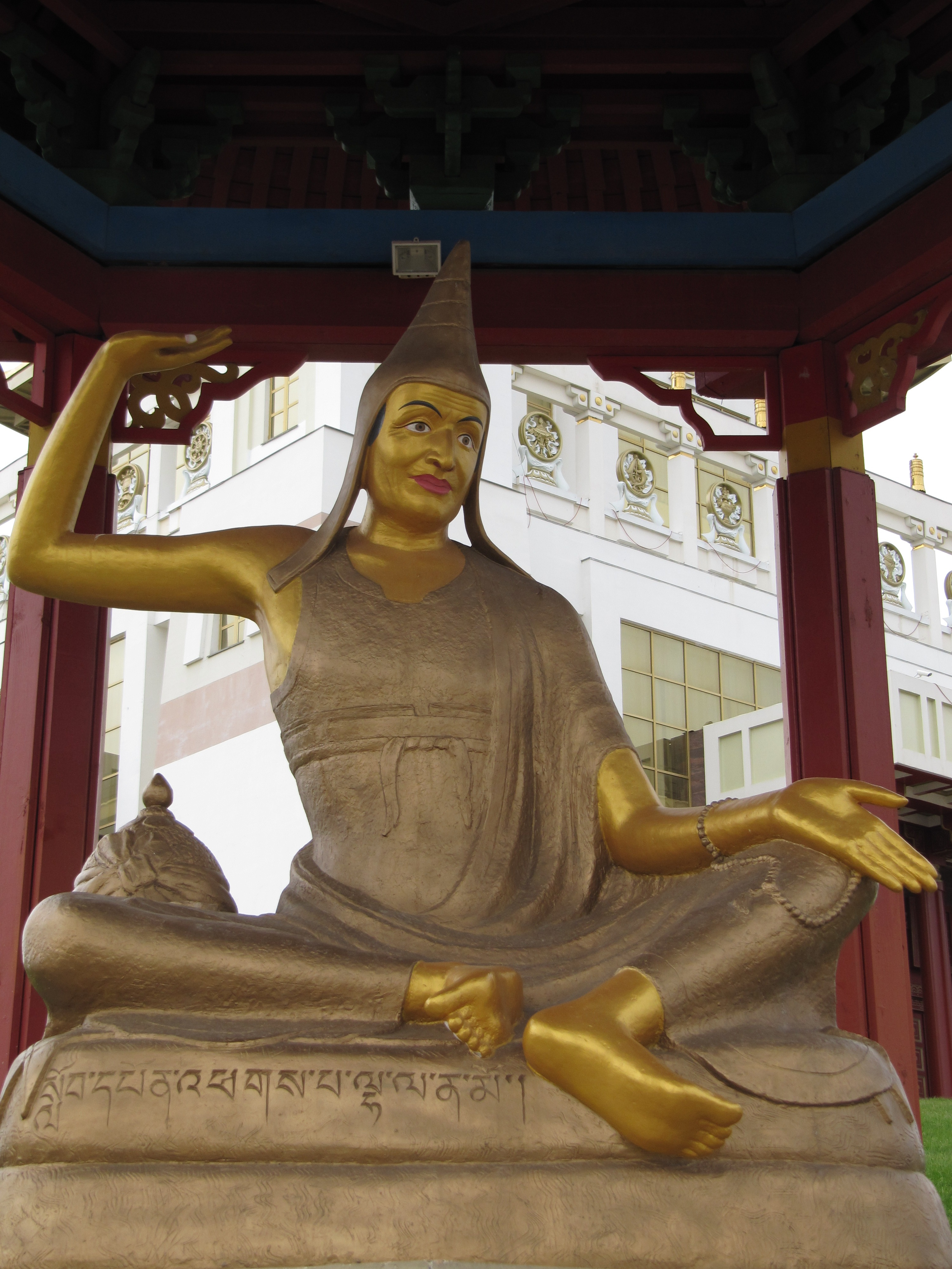 Статуя Арьядевы, Центральный хурул, Элиста, Калмыкия